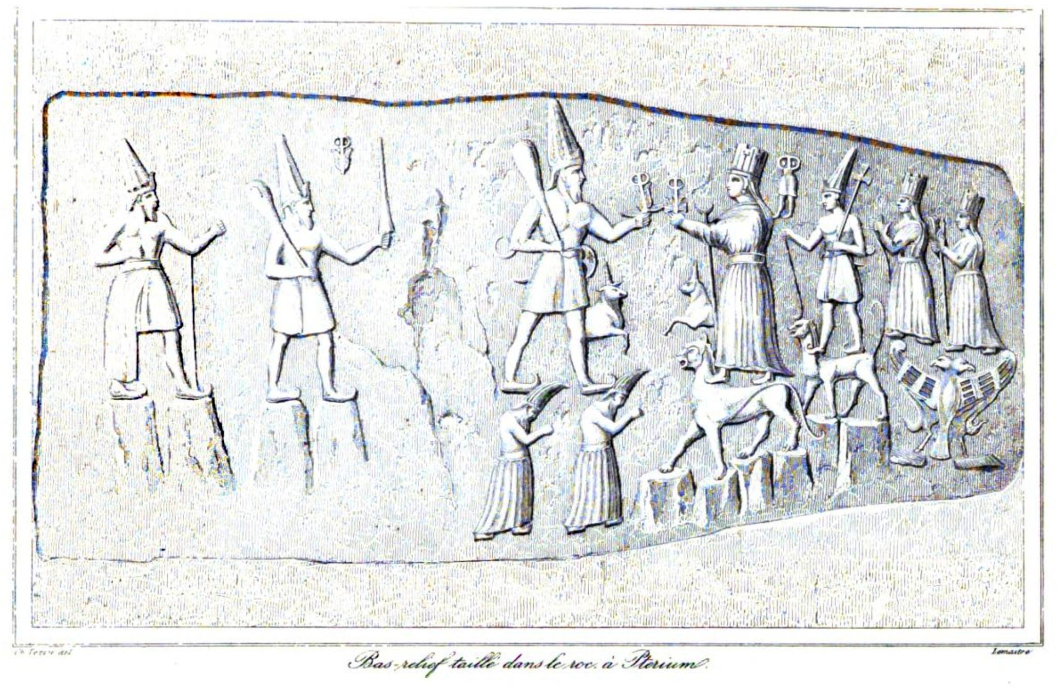 Hauptszene des hethitischen Heiligtums von Yazilikaya beu Hattusa, Zentraltürkei, Zeichnung von Charles Texier